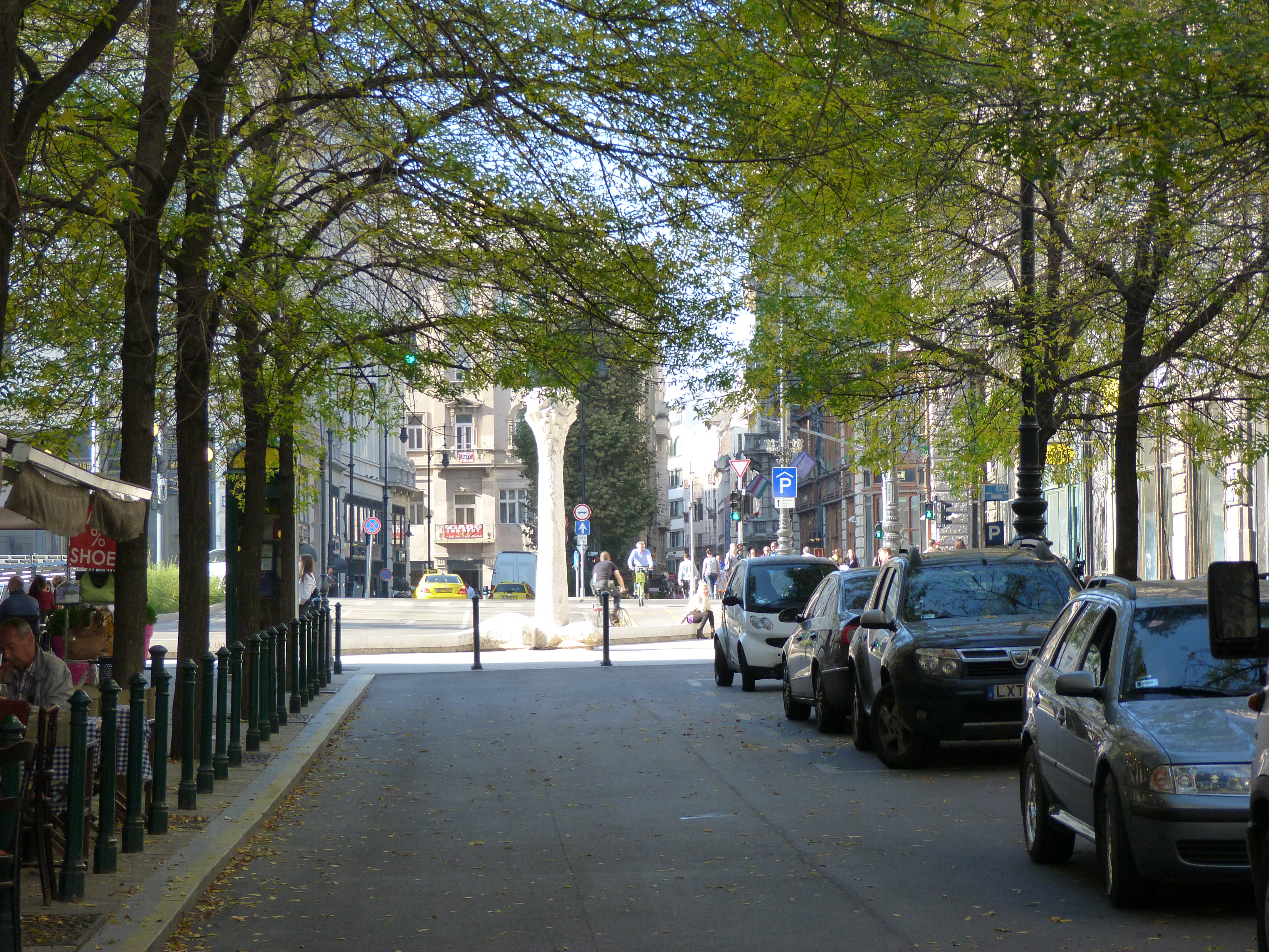 A felvétel 2014. szeptember 24-én szerdán készült Budapesten. Váci utca az Erzsébet híd pesti hídfőjénél. ©© Derzsi Elekes Andor, Budapest 2014, You are authorised to use these photos and vids under Creative Commons – even for commercial, for profit purposes. Photos must be attributed to Derzsi Elekes Andor. All of the photos and vids in the Metapolisz DVD line are under Creative Commons and can be used even for commercial – for profit – purposes. Recommended Citation Derzsi Elekes Andor: Metapolisz DVD line